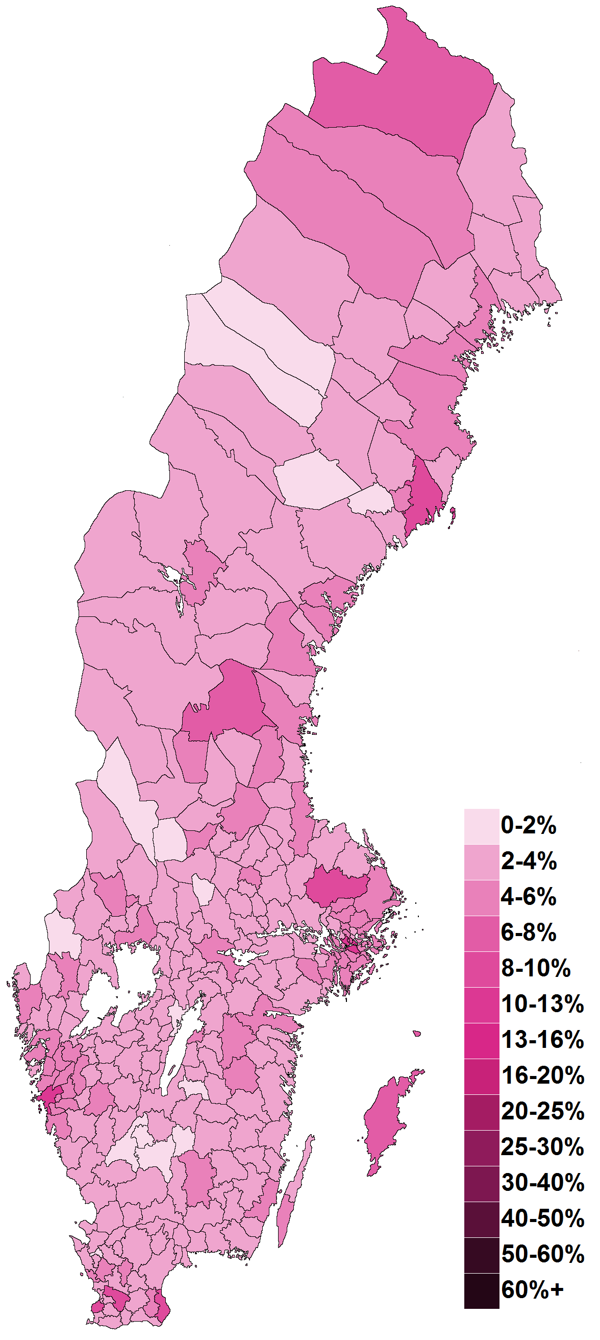 Karta som visar andelen av rösterna för Feministiskt Initiativ i europaparlamentsvalet 2014 varje kommun